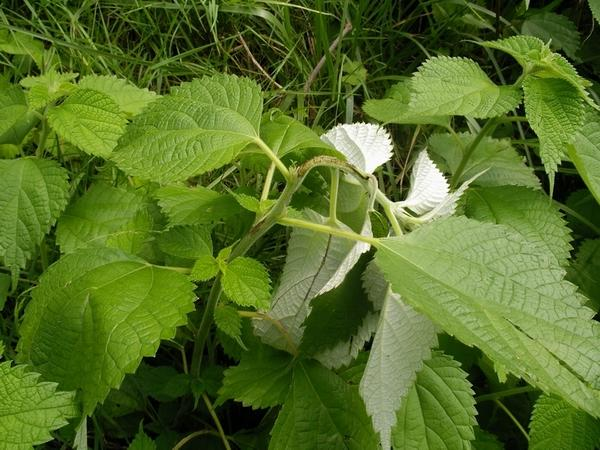 Boehmeria nivea (カラムシ), bitten by Paraglenea fortunei(ラミーカミキリの食痕), Nagasaki(長崎市)